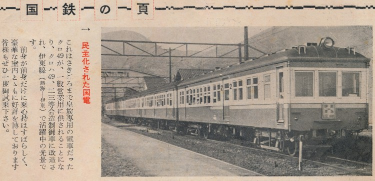 クロハ49 日本国有鉄道の広告より